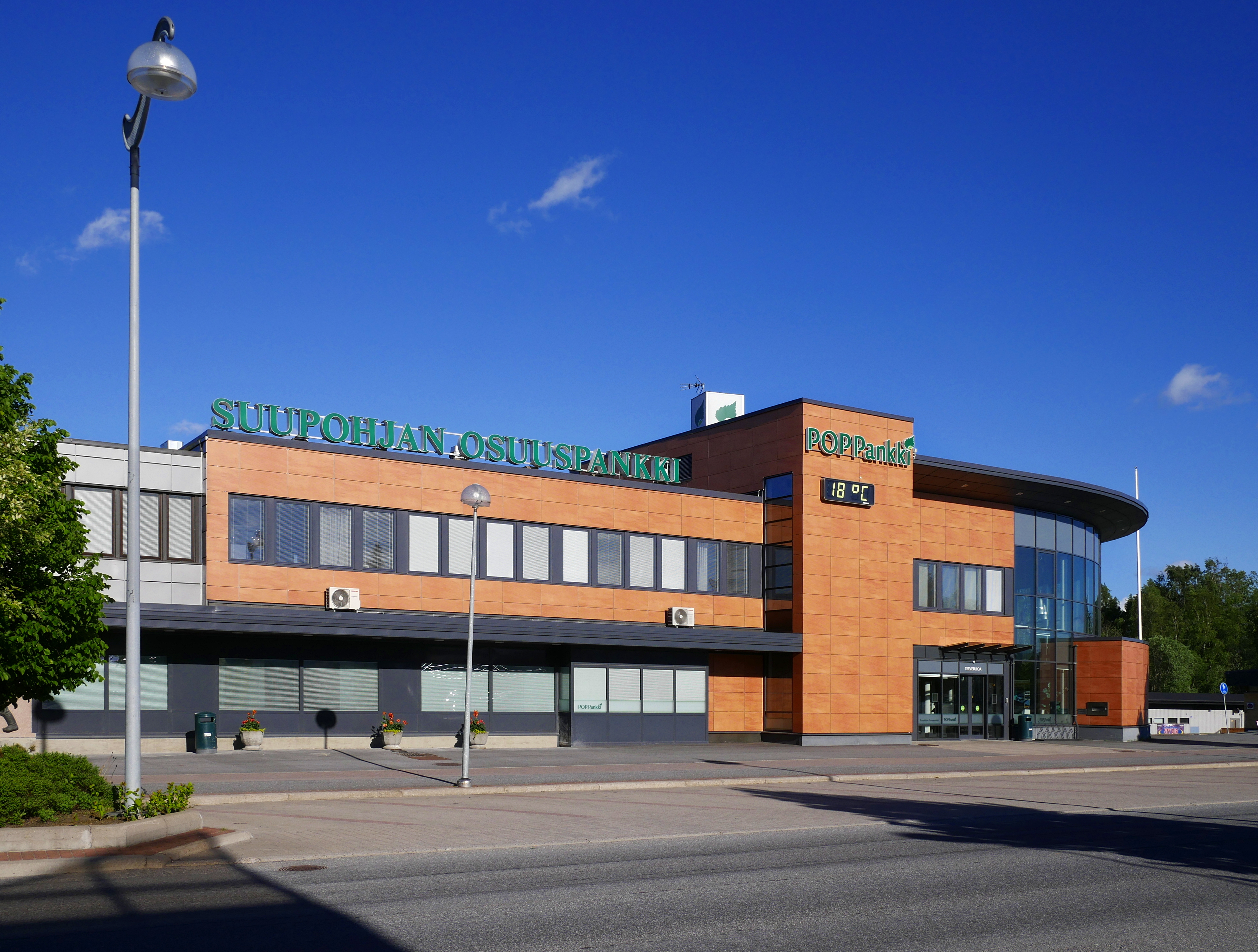 Suupohjan Osuuspankki Kauhajoella.